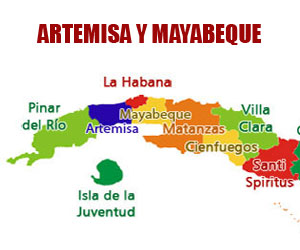 Proyecto de División de la Provincia de La Habana en Cuba en dos Provincias